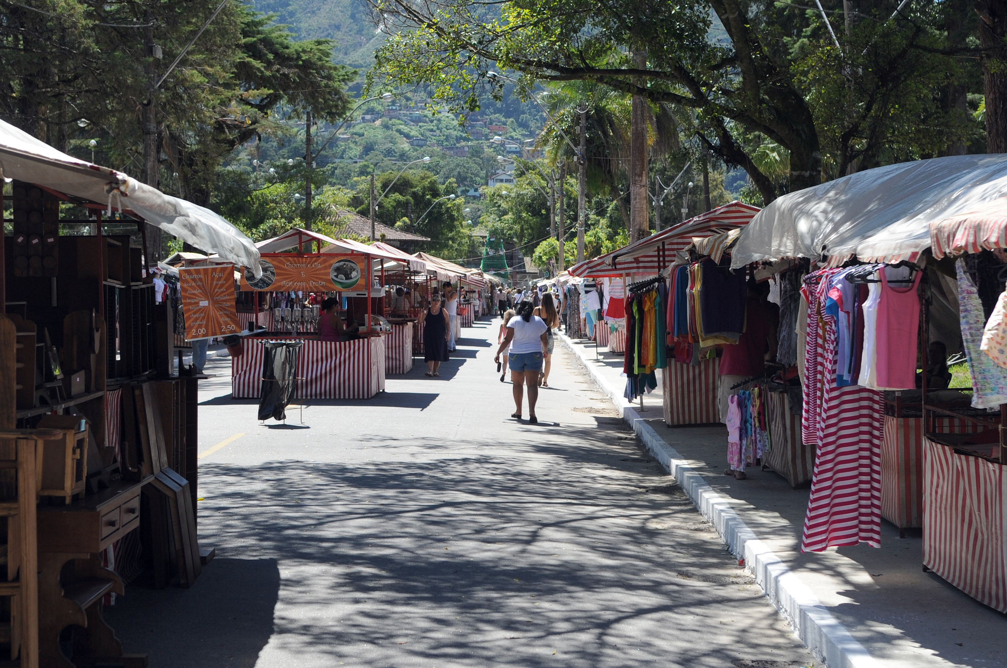 Teresópolis - Ausência de turistas por causa da tragédia das enchentes esvazia tradicional feira de artesanato